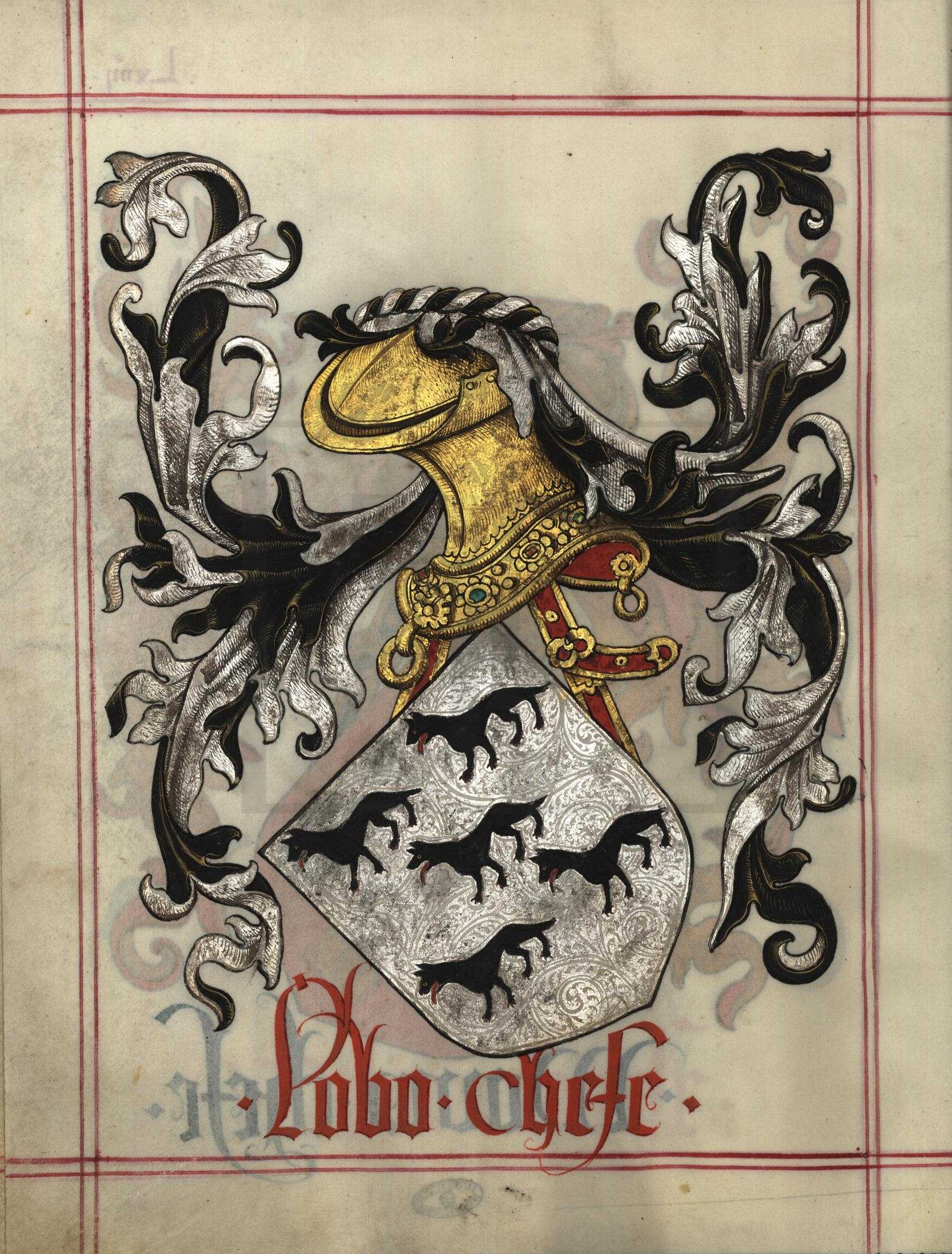 Livro do Armeiro-Mor, Lobo (fl 64v)